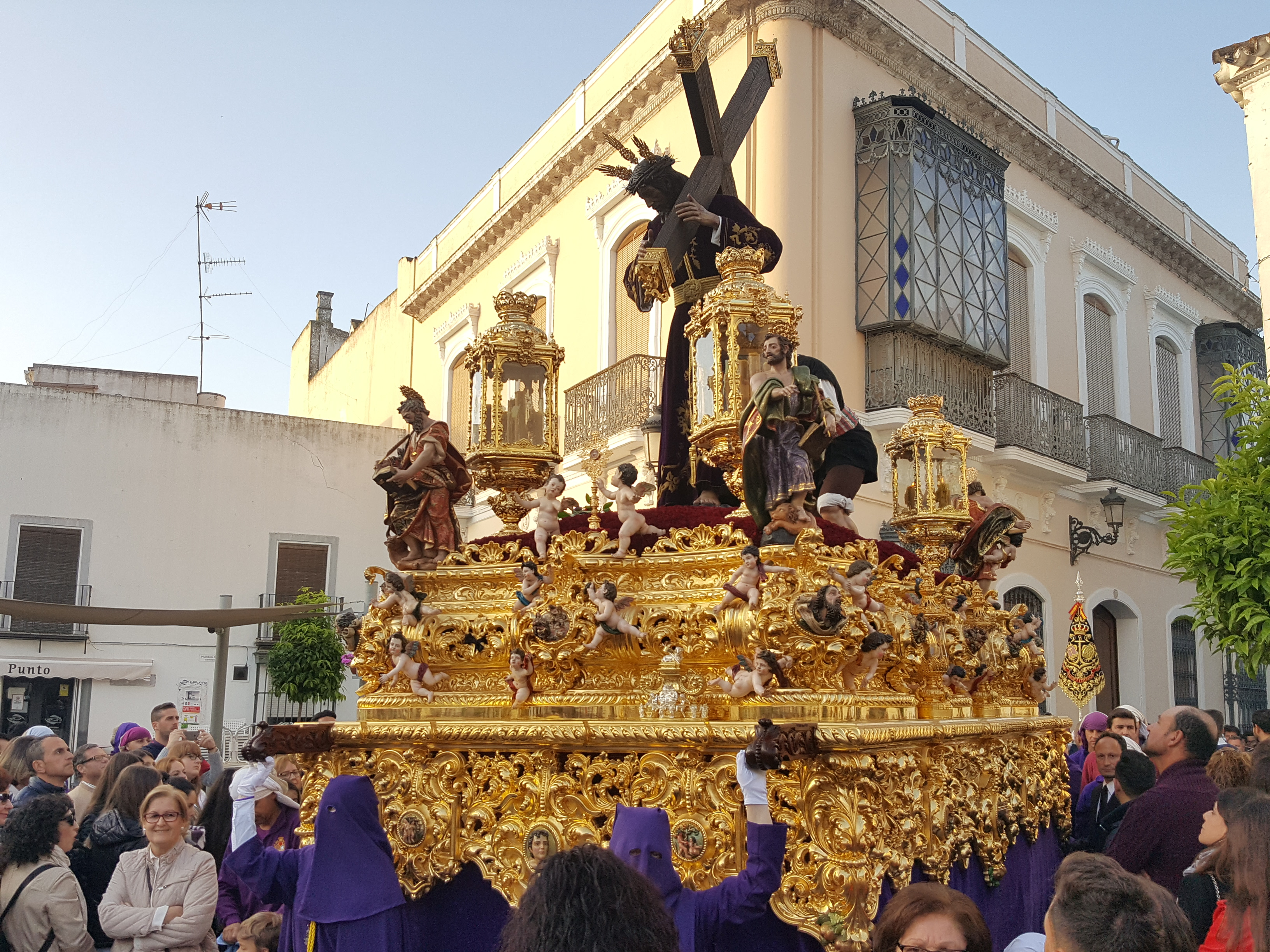 Hermandad de la Padre Jesús. Desfile procesional del Viernes Santo madrugada. Vista del paso de Padre Jesús por el casco urbano de Moguer.